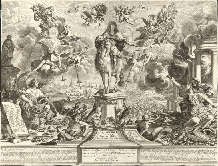 Apotheose. Stich von Matthäus Küsel.